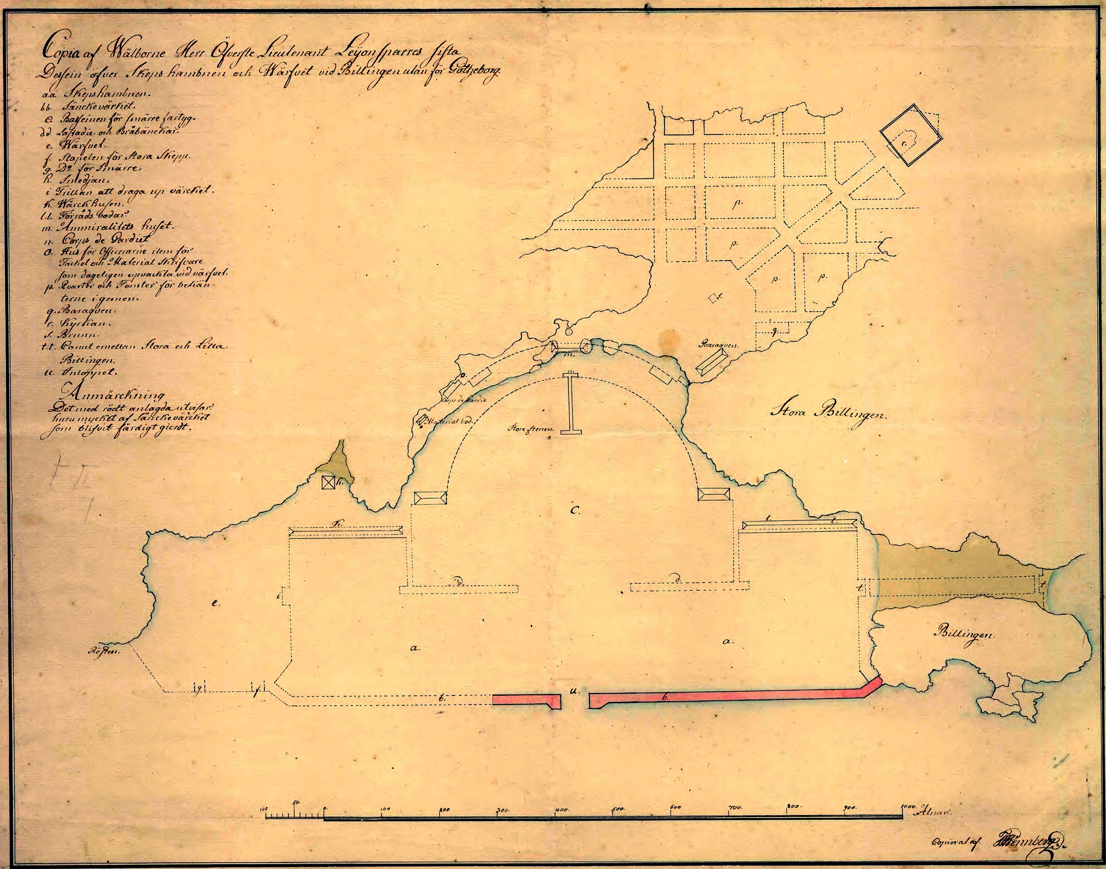 Copia af Wälborne Herr Öfverste Lieutenant Leijonsparres sista Dessein öfver Skeps hambnen och Wärfvet vid Billingen utan för Götheborg. (Nya Varvet)